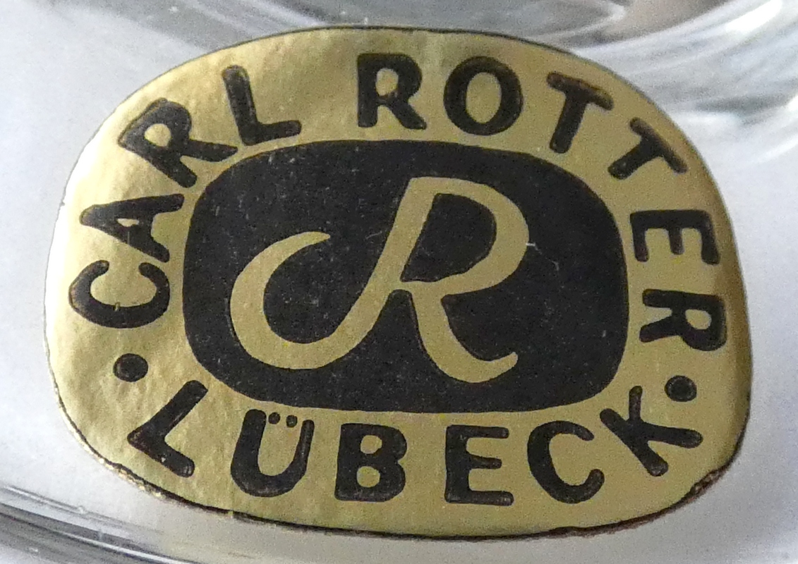 Carl Rotter / Aufkleber mit Firmenlogo